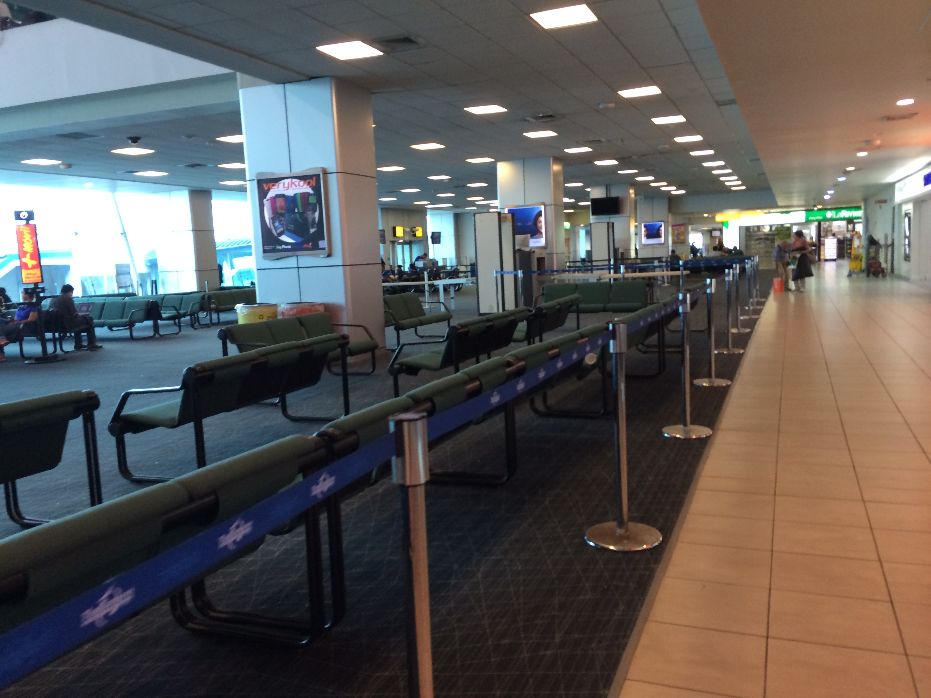 Interior del Aeropuerto Internacional de Panamá.